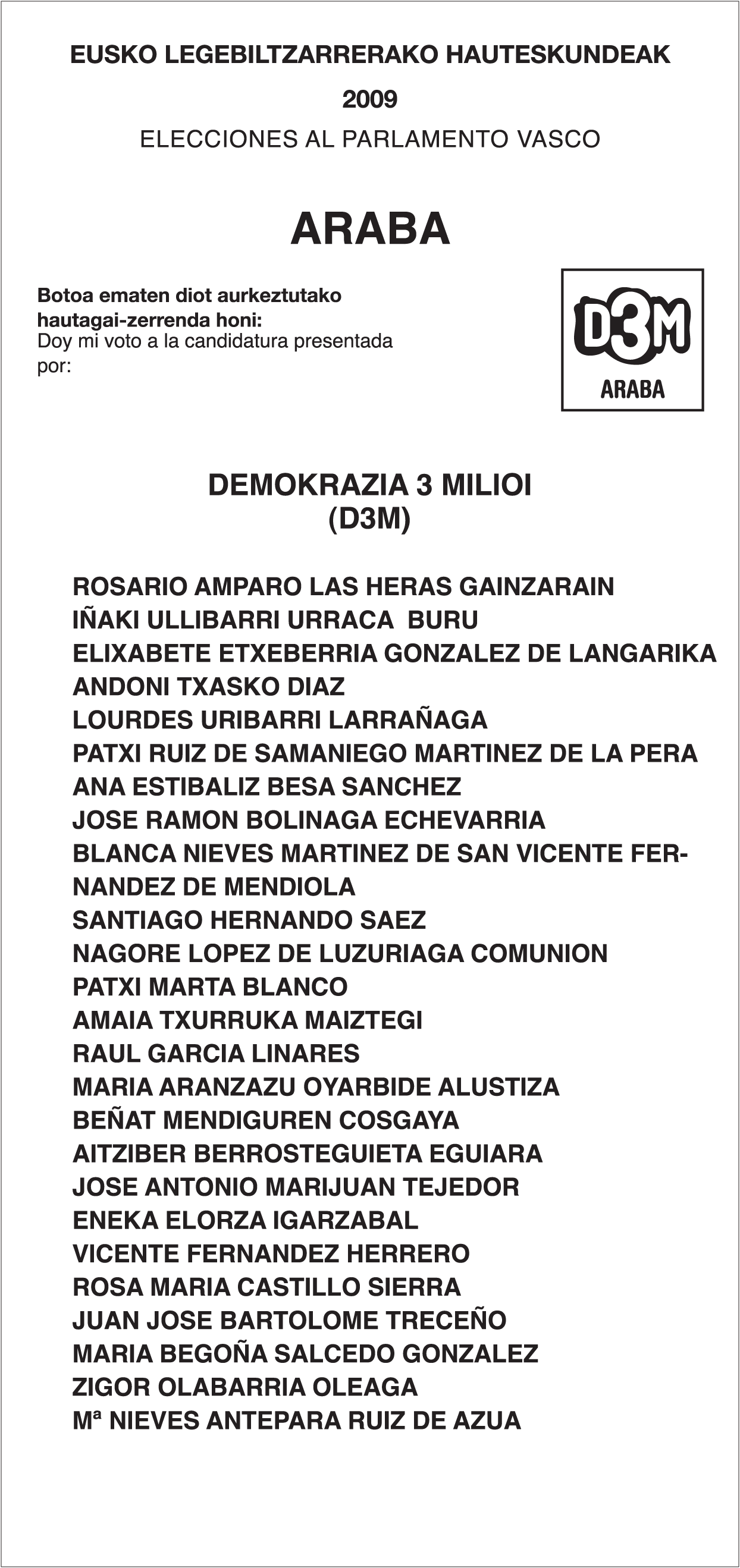 D3Mren Arabako bozka-papera